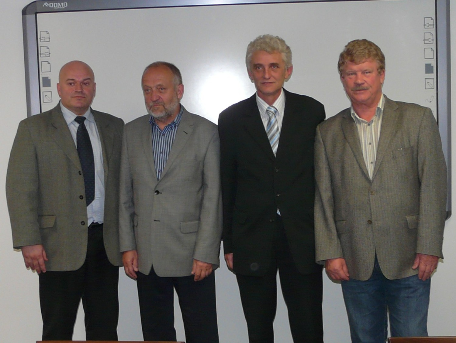 Stargard, 2011r. Były Prezes Spójni Krzysztof Orzechowski (P)